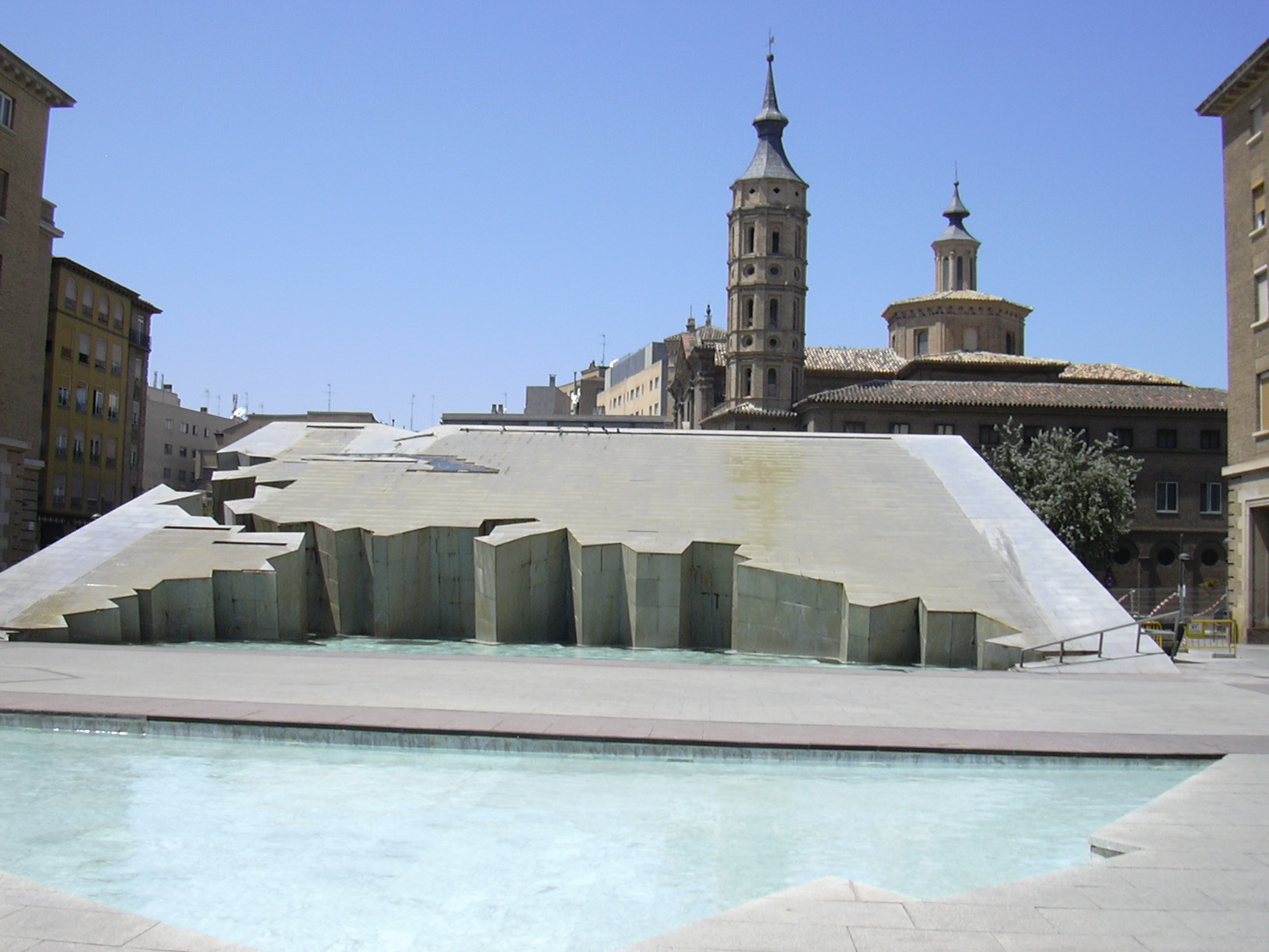 Fuente de la Hispanidad, en Zaragoza (España).